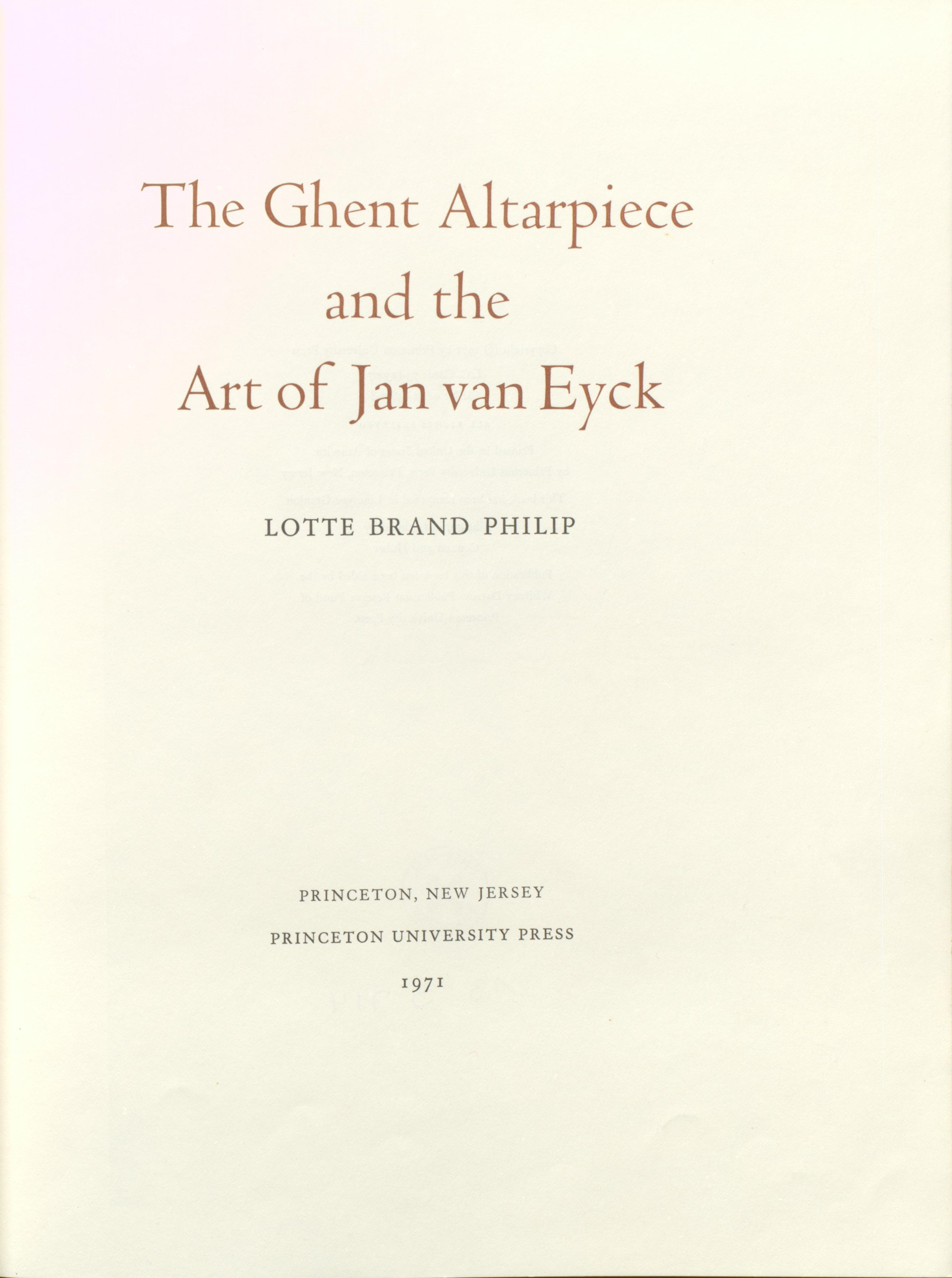 Lotte Brand Philip The Ghent Altarpiece and the Art of Jan van Eyck. Princeton : Princeton University Press, 1971